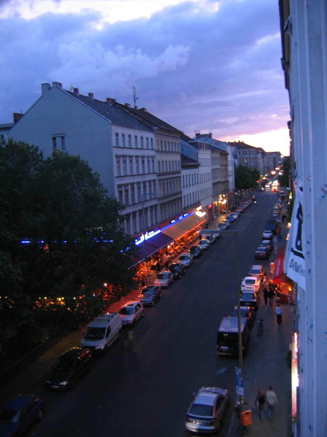 Der Block 104 bezeichnet einen Altbau-Komplex in Berlin-Kreuzberg. Er wurde bis 1981 zur Hälfte zerstört, der Rest blieb durch die Hausbesetzer-Bewegung erhalten. Die zum Abriss vorgesehenen Oranienstraße heute.